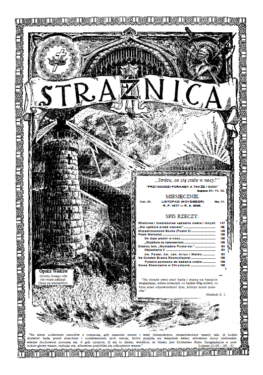 Polska edycja Strażnicy nr 11 z 1917 roku wydawana przez Hipolita Oleszyńskiego w Chicago